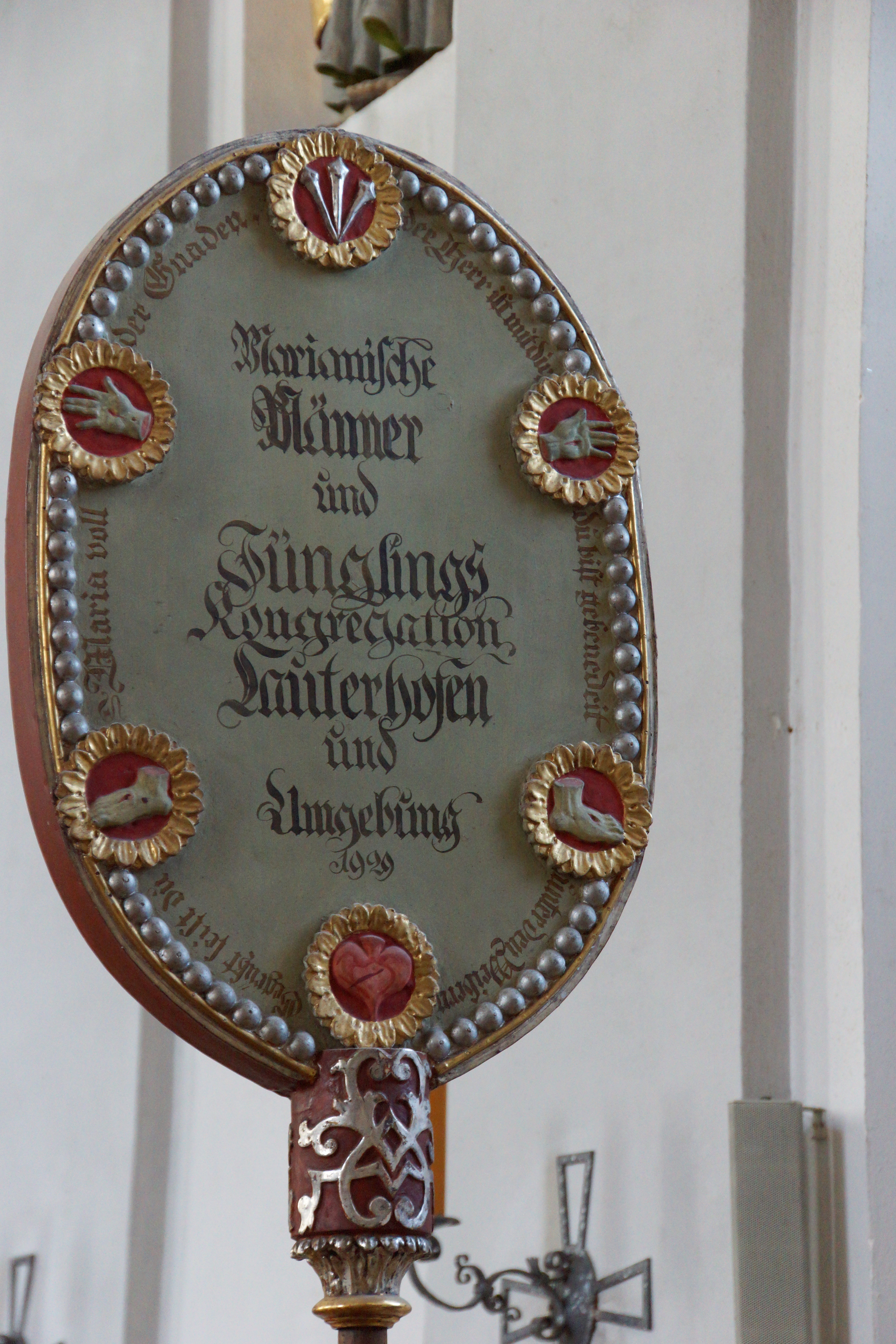 Die katholische Pfarrkirche St. Michael im Markt Lauterhofen in der Oberpfalz